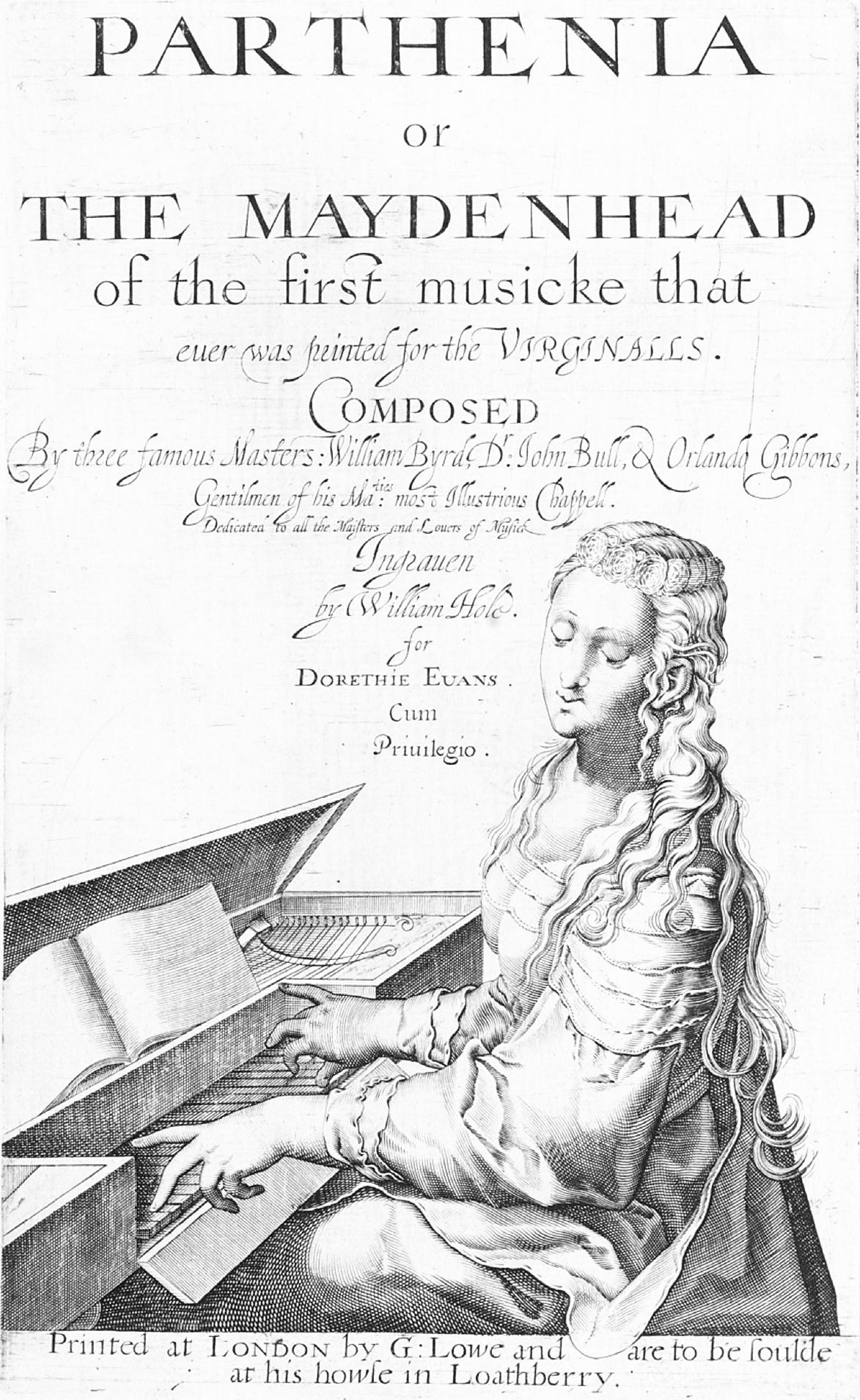 Titre de la page du premier recueil pour clavier édité en angleterre :il contient des pièces de William Byrd, John Bull et Orlando Gibbons. (vers 1611).